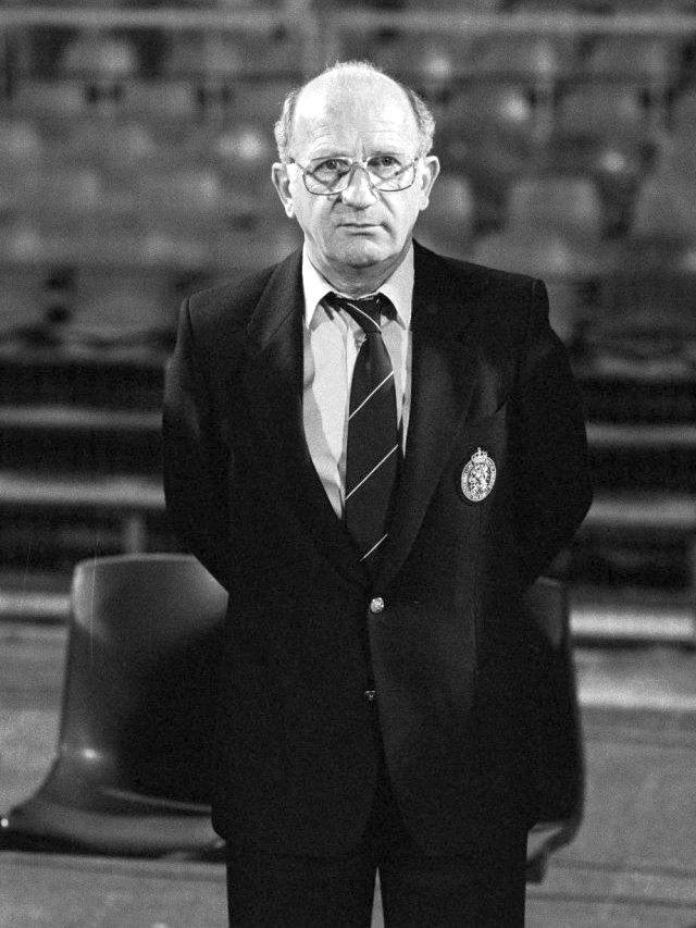 Bondscoach Kees Rijvers.